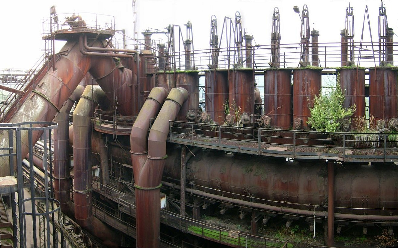 Völklinger Hütte